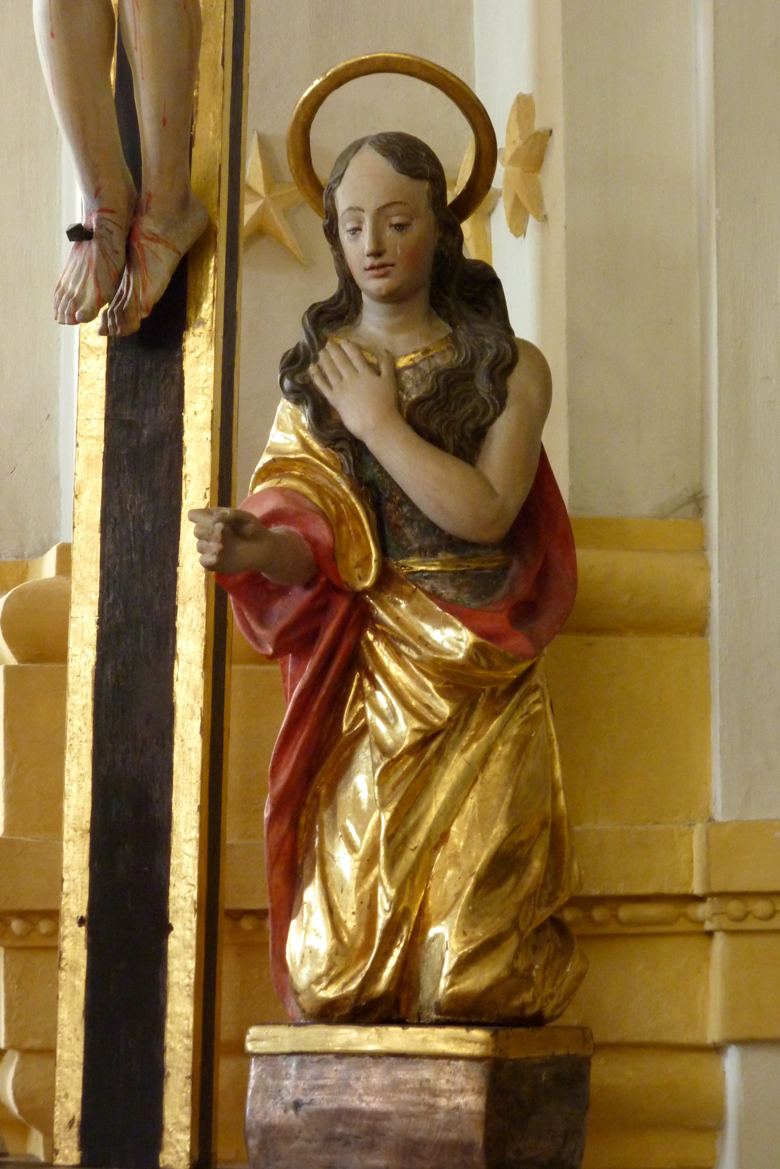 Katholische Pfarrkirche Mariä Himmelfahrt, ehemalige Klosterkirche des Zisterzienserinnenklosters Niederschönenfeld im Landkreis Donau-Ries (Bayern), von 1659 bis 1662 Wiederaufbau durch Konstantin Pader, Kreuzigungsgruppe, Skulptur der Maria Magdalena (1. Hälfte 18. Jh.)